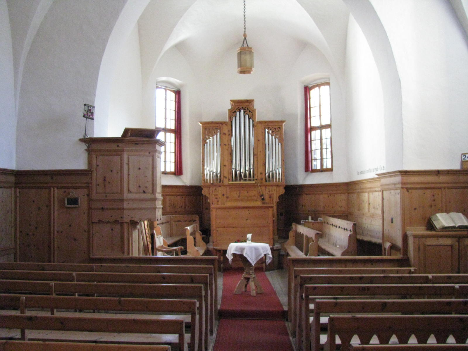 Innenansicht der ref. Kirche Crasta (Santa Maria Madlaina)